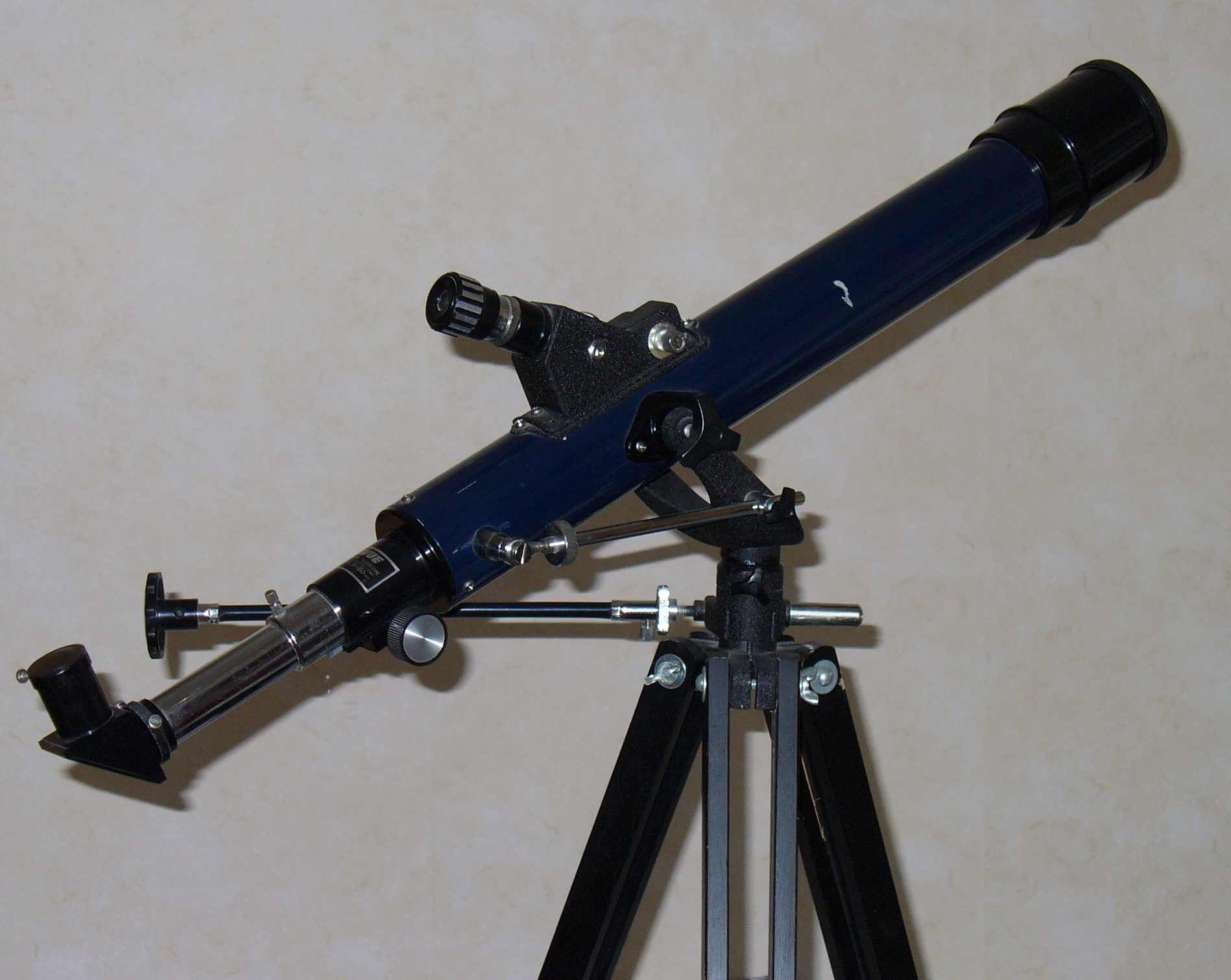 Refraktor mit 60 mm Objektivöffnung und 700 mm Brennweite auf azimutaler Gabelmontierung, Feineinstellung in beiden Achsen